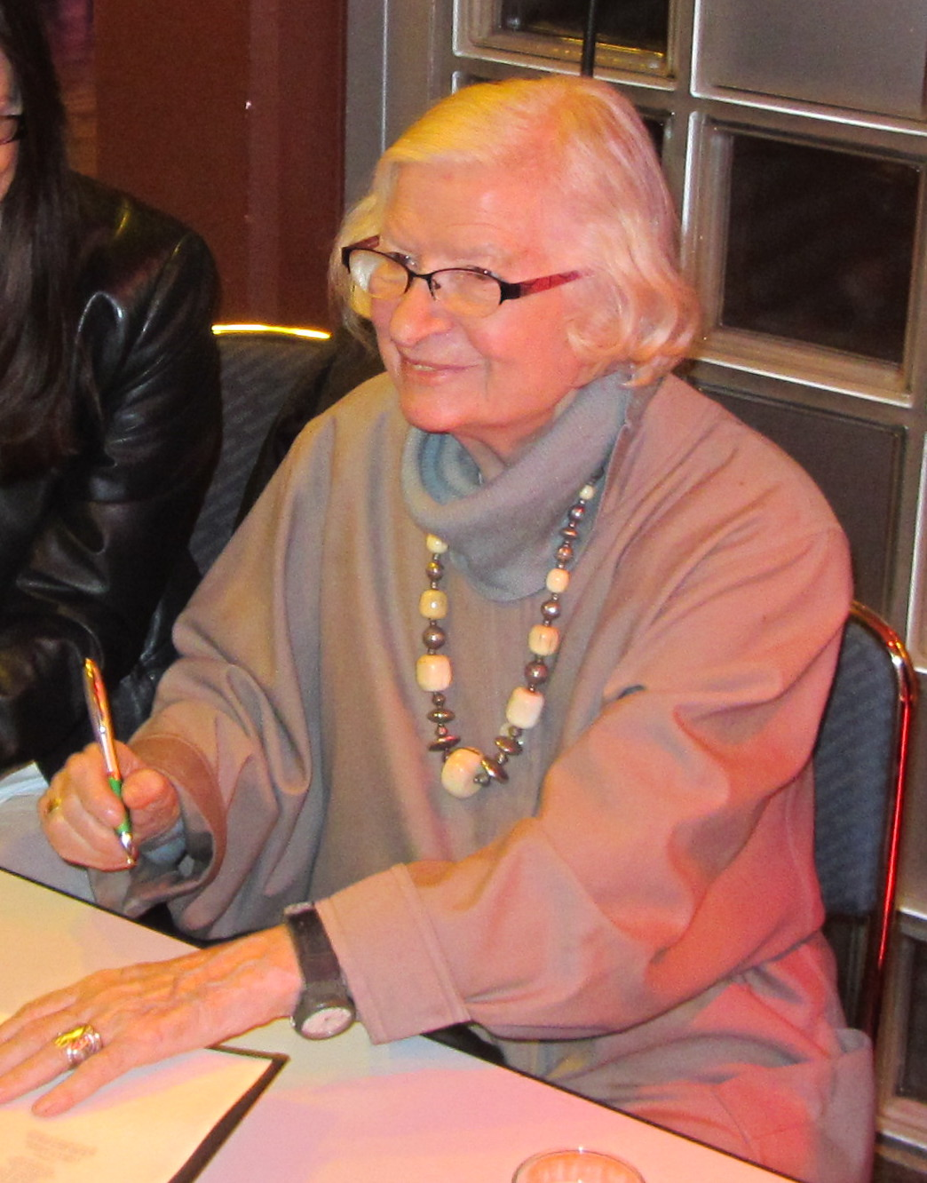 Autorin P. D. James nach einer Lesung auf dem Literaturfest lit.Cologne im Kölner Theater am Tanzbrunnen